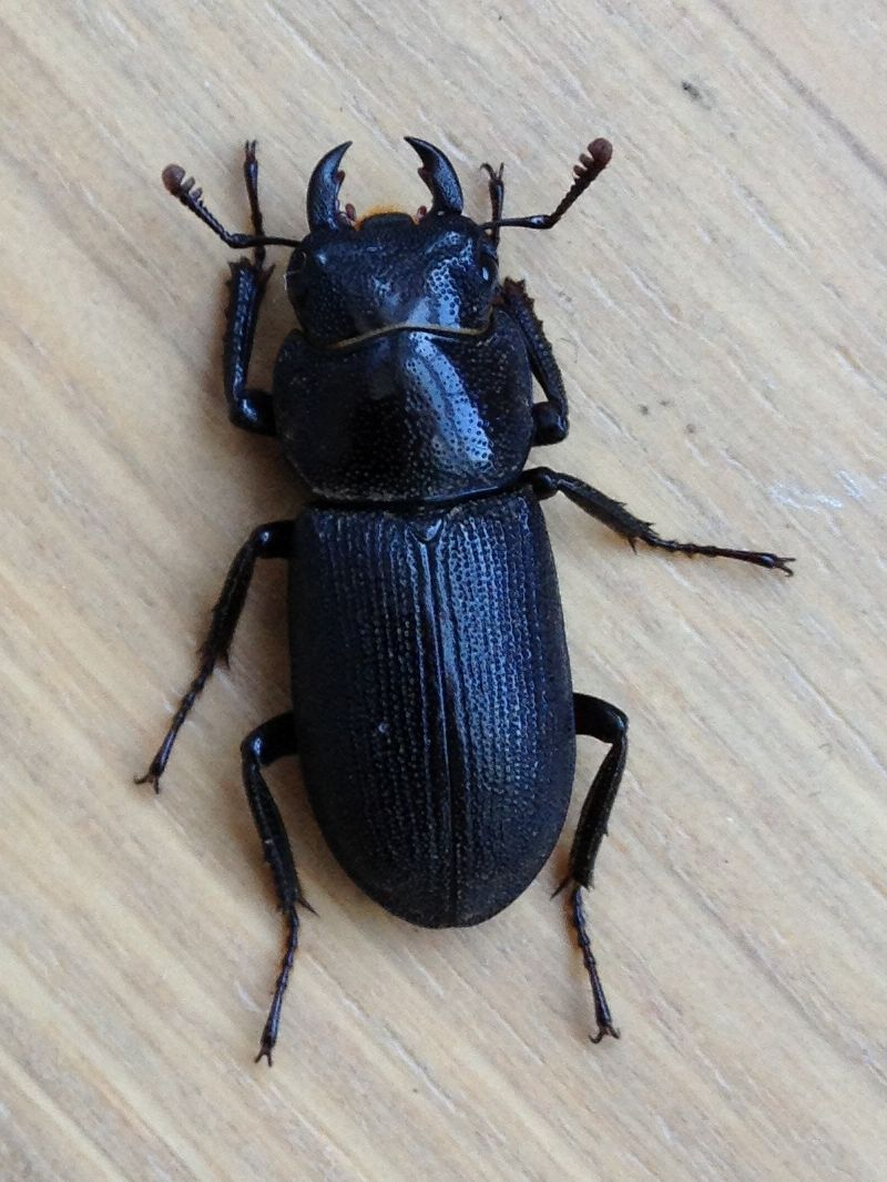 endingokによる撮影